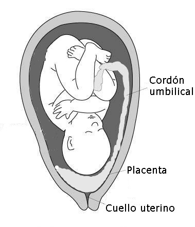 twee vormen van vasa previa